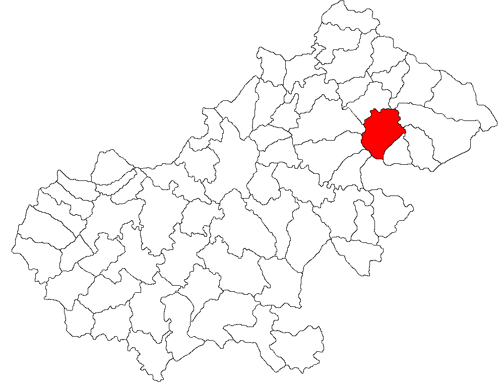 Categorie:Hărţi ale judeţului Satu Mare